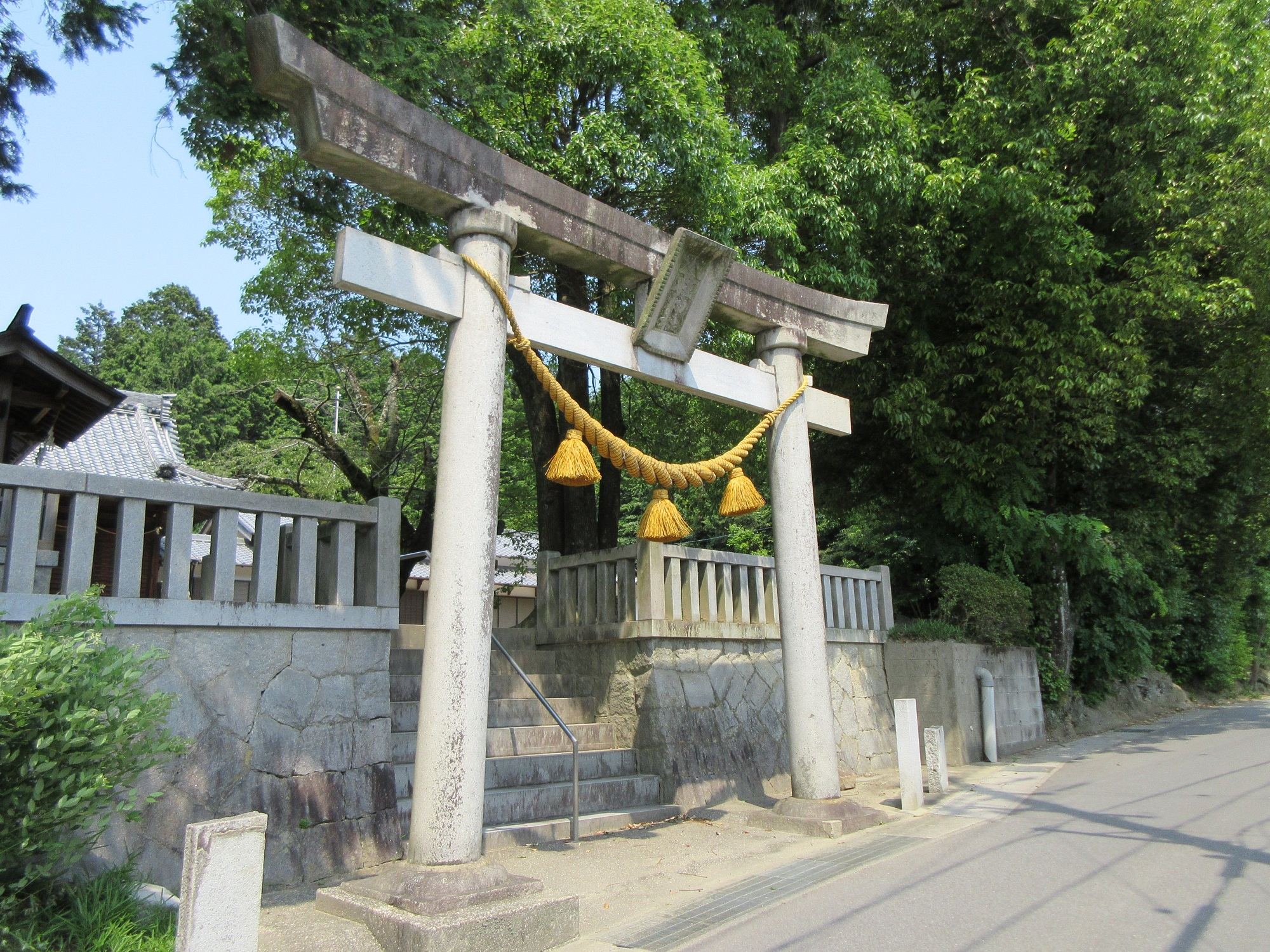 八柱神社（岡崎市洞町）